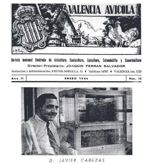 Portada de Valencia Avícola con Javier Cabezas en portada (1946), importante figura de la apicultura española.